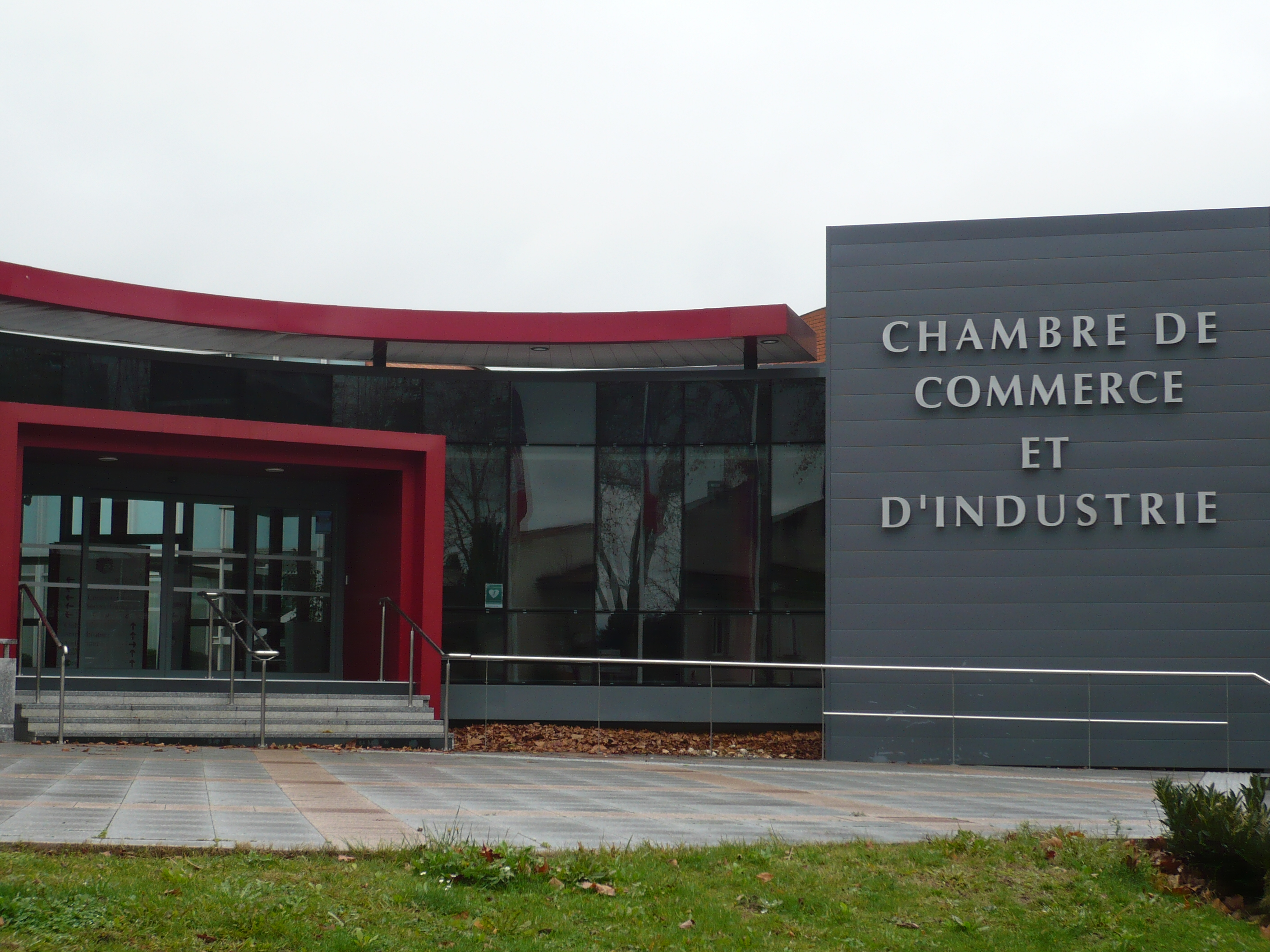 Castres